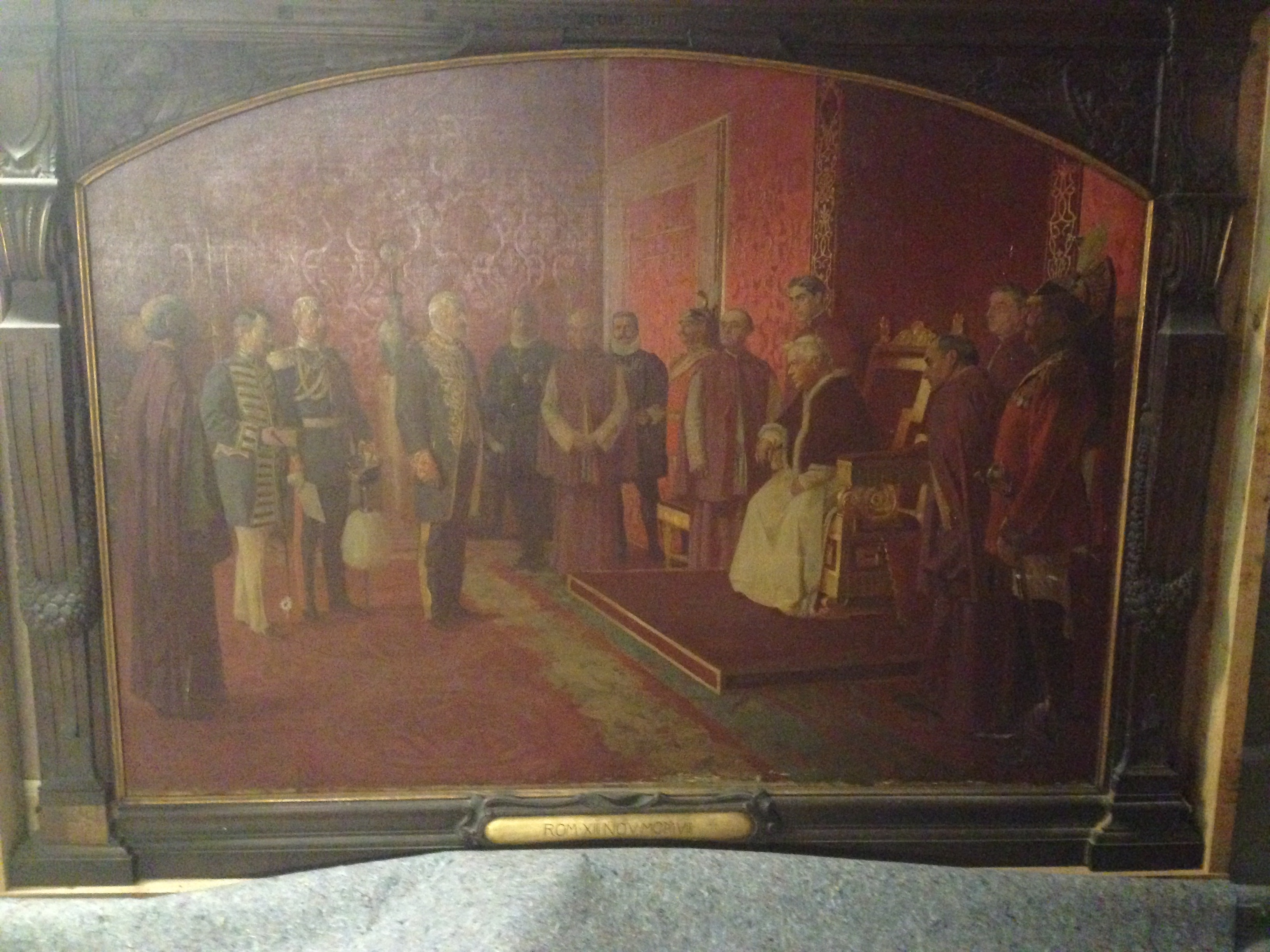 Schorlemer auf besuch bei dem Papstes Pius VII